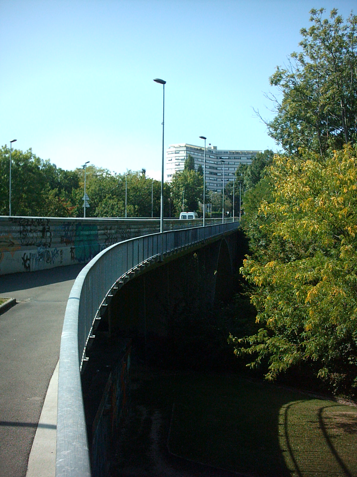 Pont de Lancy à Genève (Suisse)